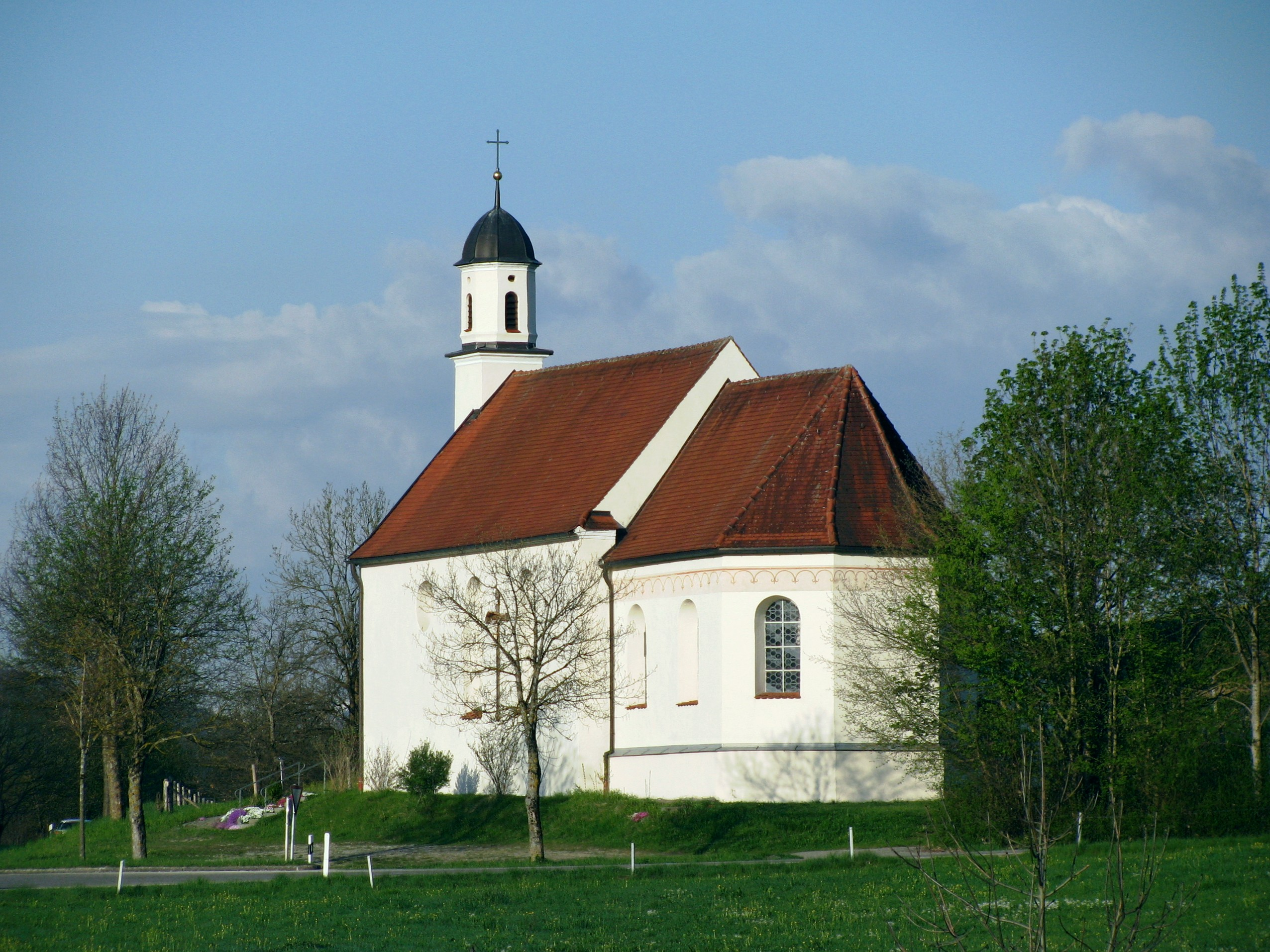 Kapelle St. Wendelin; Bau um 1679/80, um Mitte 18. Jahrhundert erneuert.